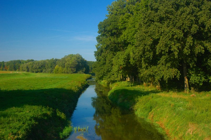 Myjava in CHKO Záhorie